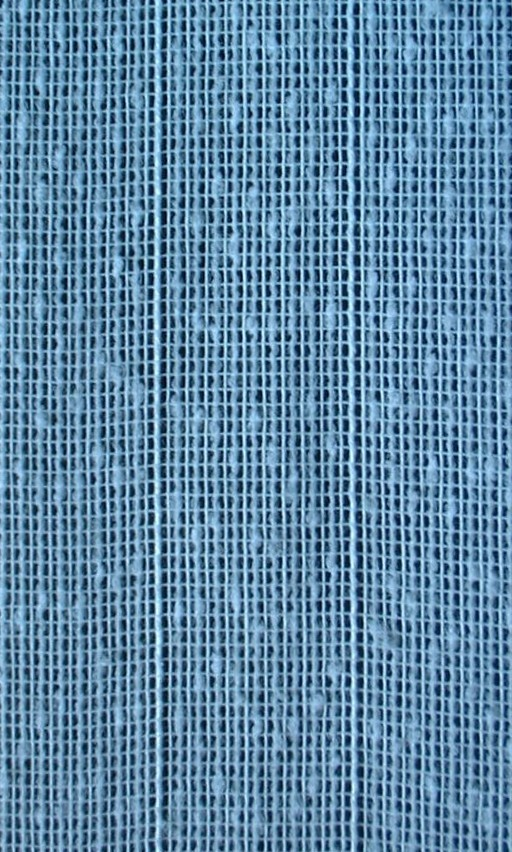 Stehfäden im Gardinenstoff